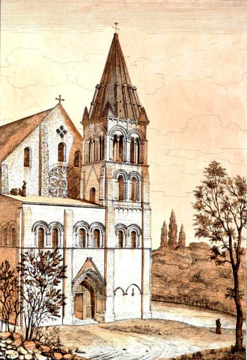 Reconstitution de la façade au XVIIIe siècle.